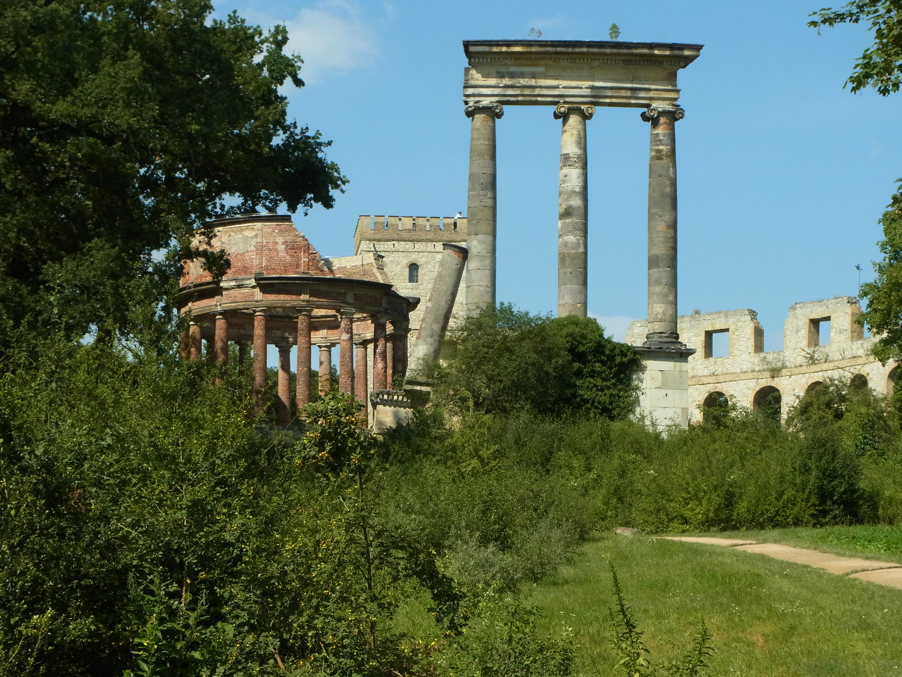 Anlage auf dem Ruinenberg in Potsdam